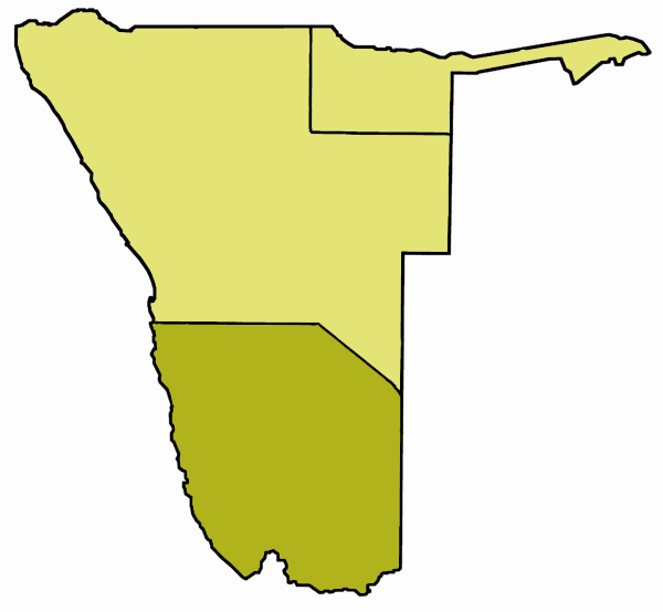 Karte vom Bistum Keetmanshoop